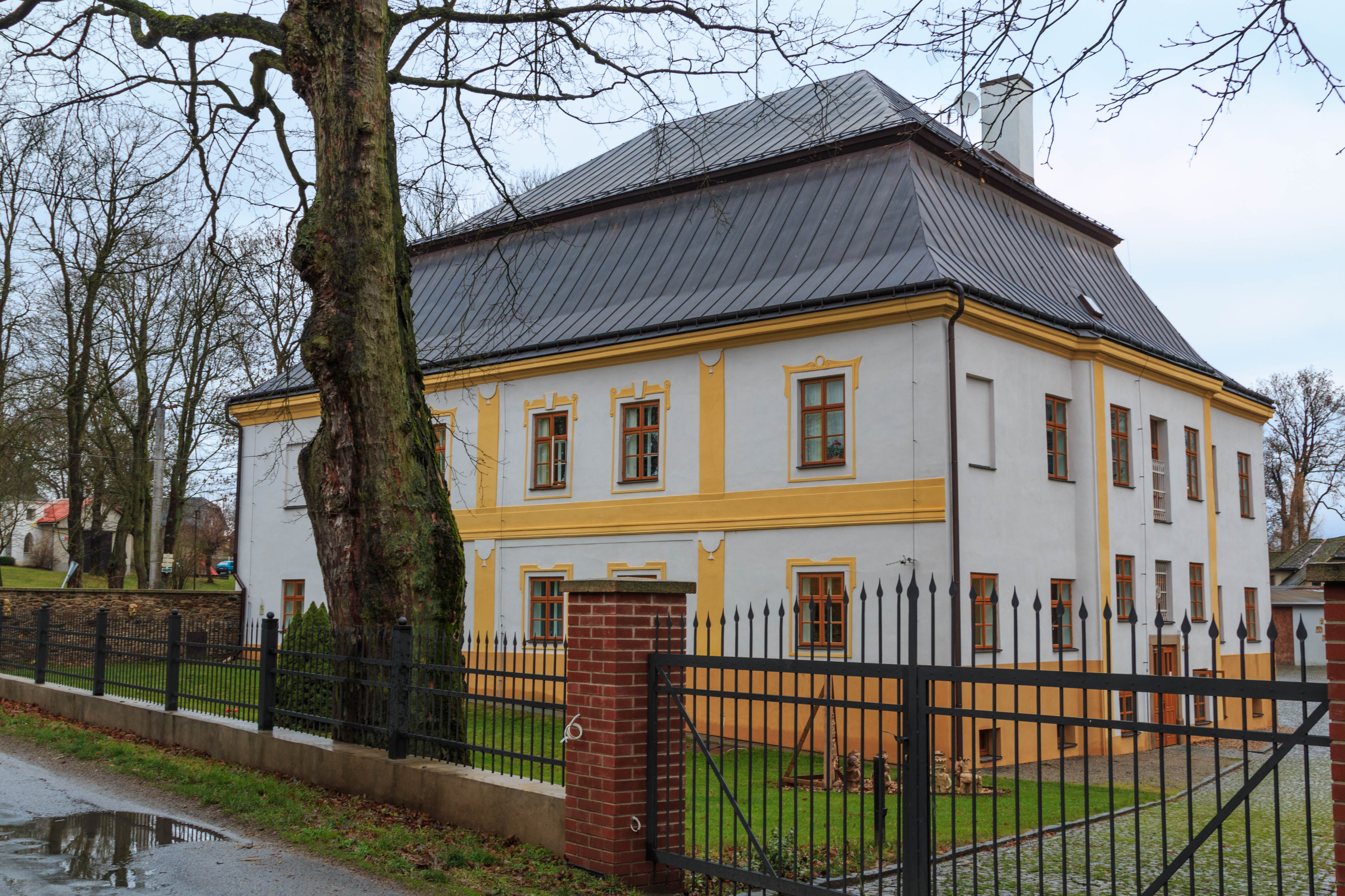 Zámek Zboží, JV strana návsi 1, Zboží, Zboží (Habry).